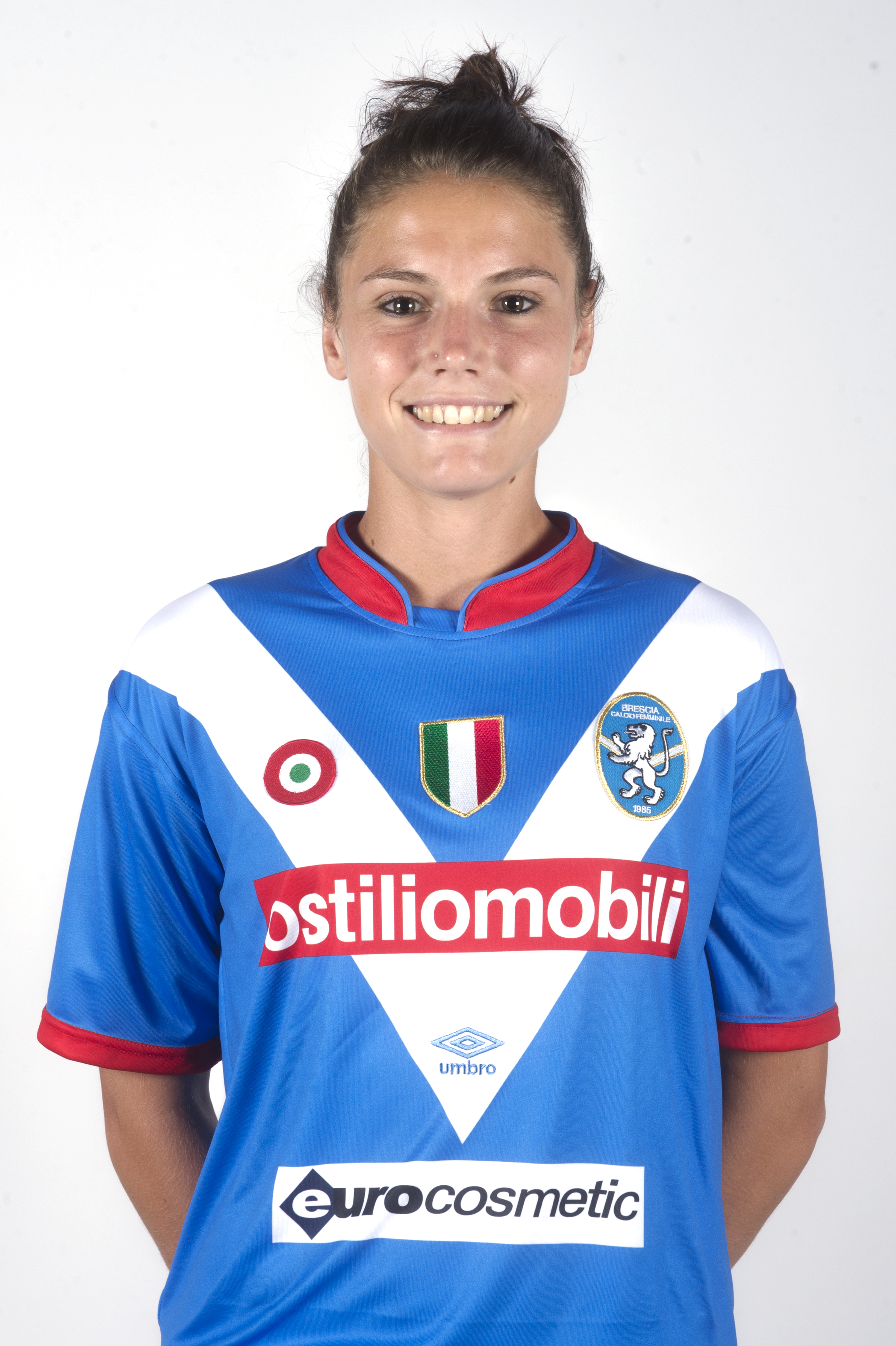 Cecilia Salvai, difensore, foto ufficiale Brescia Calcio Femminile stagione 2016-2017.